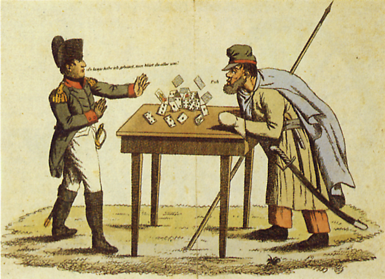 German caricature